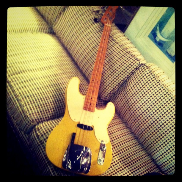 “Fender p bass $400”